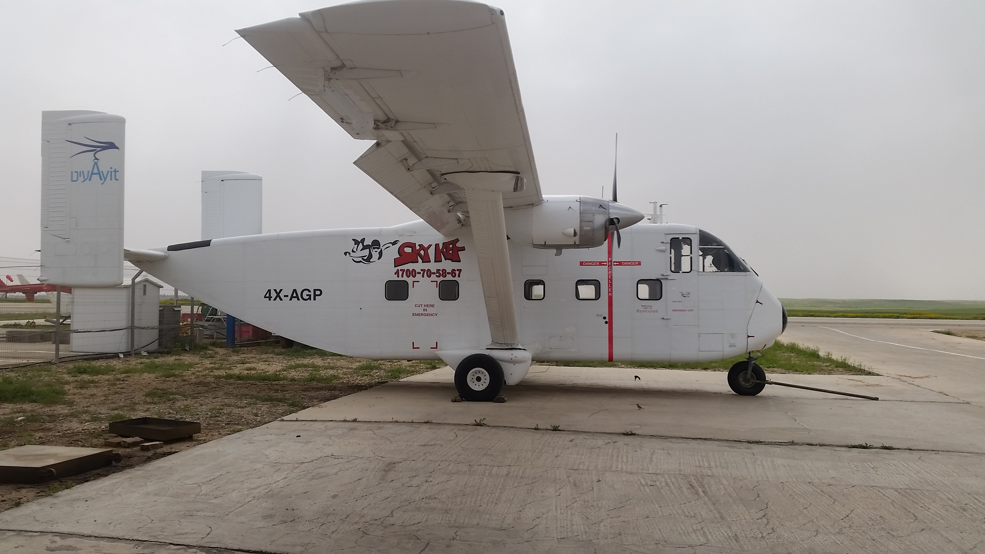 מטוס השורט סקייואן Skyvan, אשר חונה במנחת תימן ומשמש לטיסות הצנחה